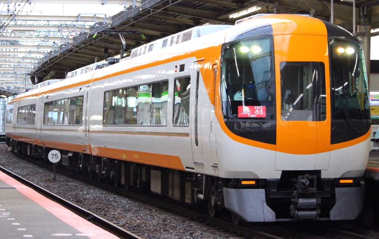 近鉄22600系AF01編成(新塗装) 大和八木駅